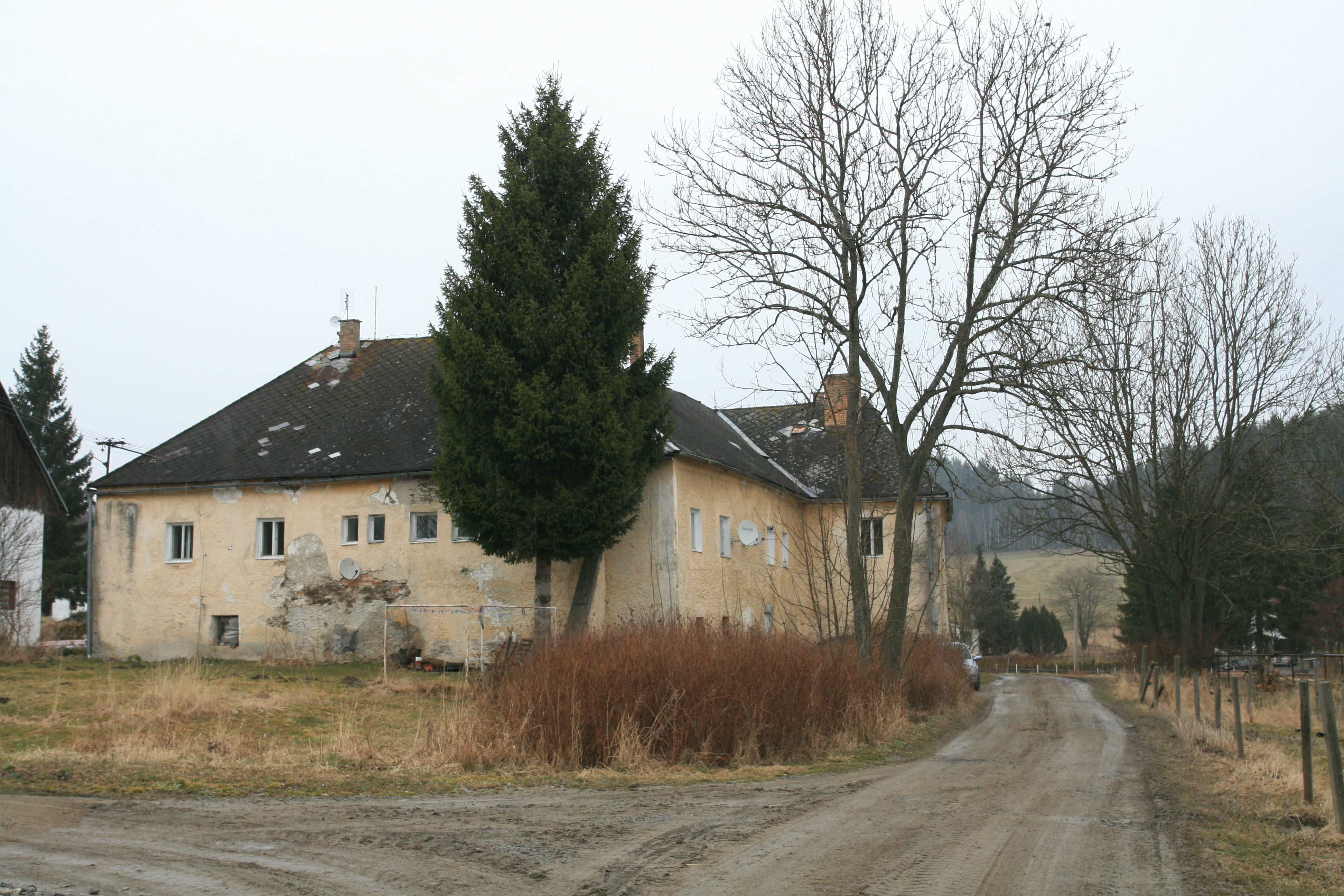 Vesnice Michnice, část obce Rožmitál na Šumavě v okrese Český Krumlov. Statek č. 1 se zemědělským dvorem. Pohled z cesty od jihu.